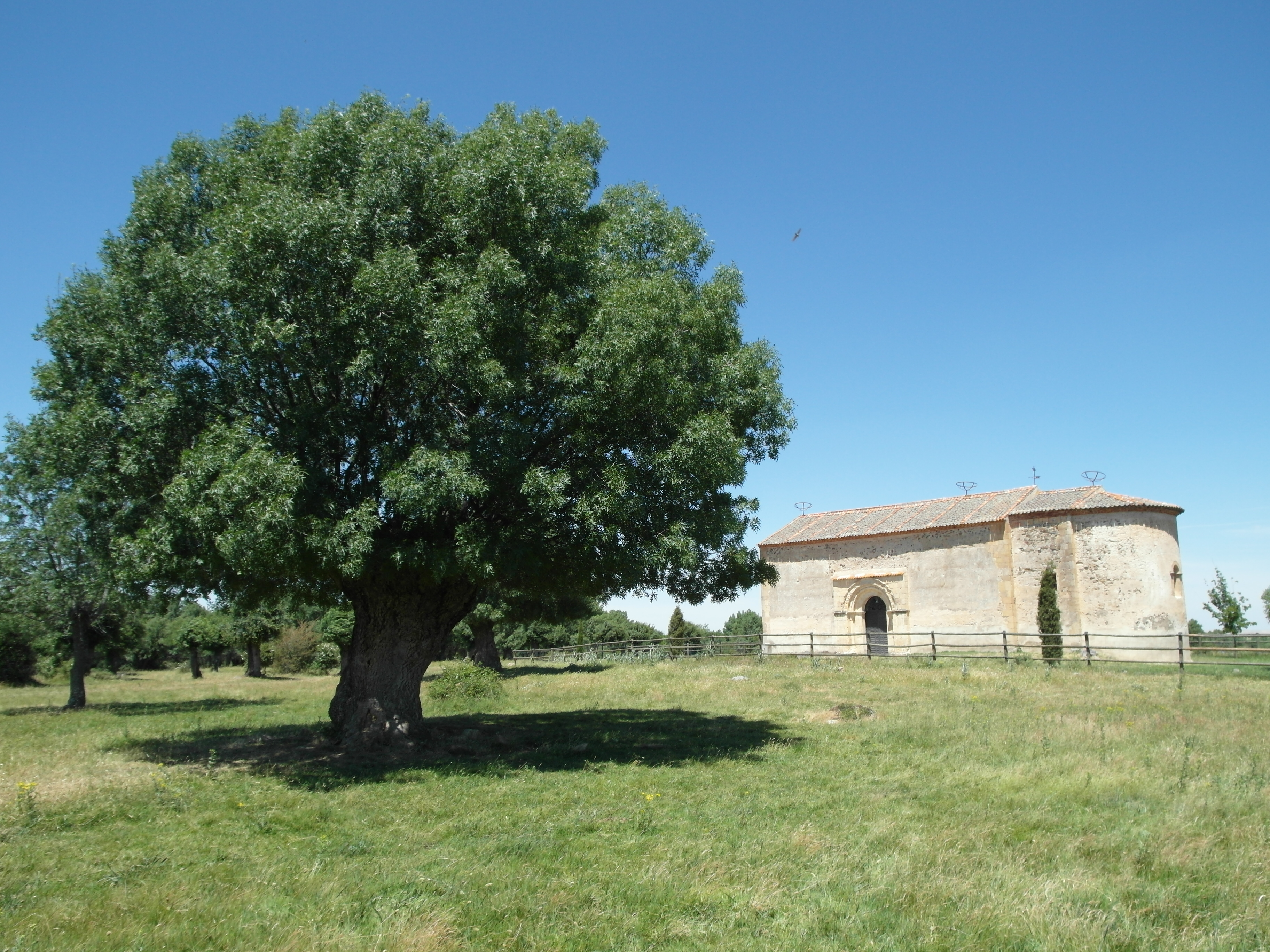 Ermita románica de Nuestra Sñora del Soto, Revenga, Segovia.